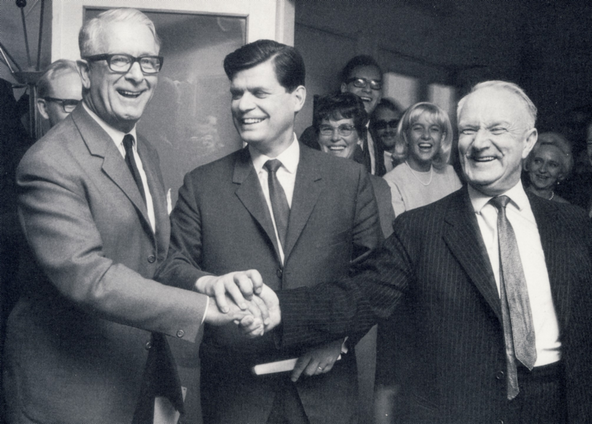 Från vänster: Bertil Ohlin, Yngve Holmberg och Gunnar Hedlund